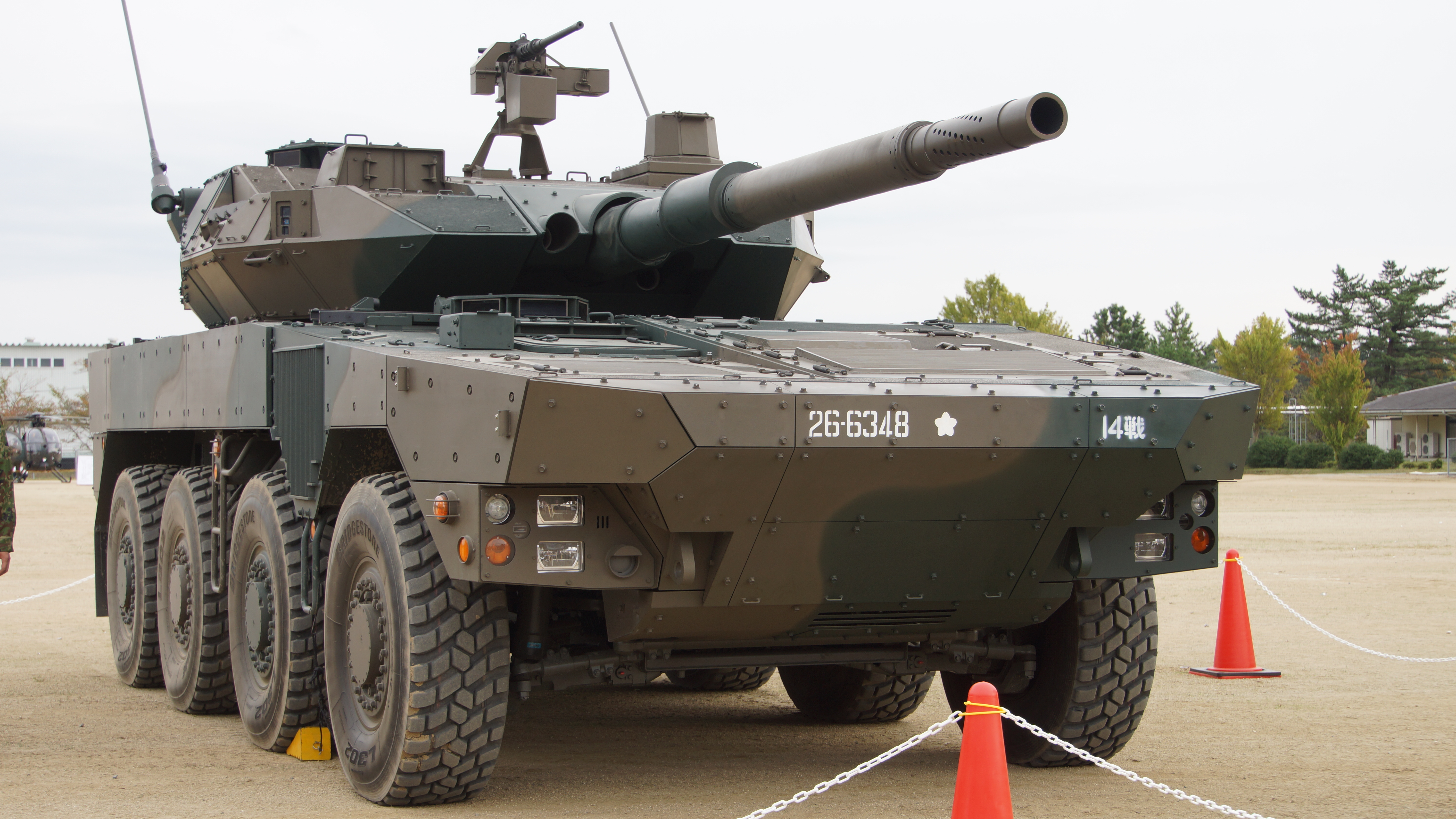 陸上自衛隊 16式機動戦闘車（26-6348号車） 右前部。2017年10月1日 日本原駐屯地にて。